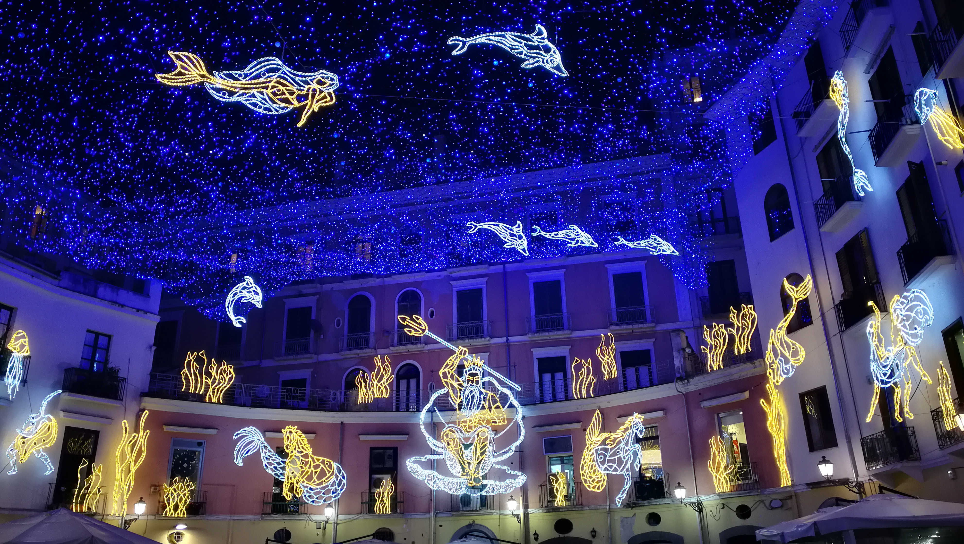 Luci d'Artista a Salerno, Piazza Flavio Gioia (Edizione 2017/18)